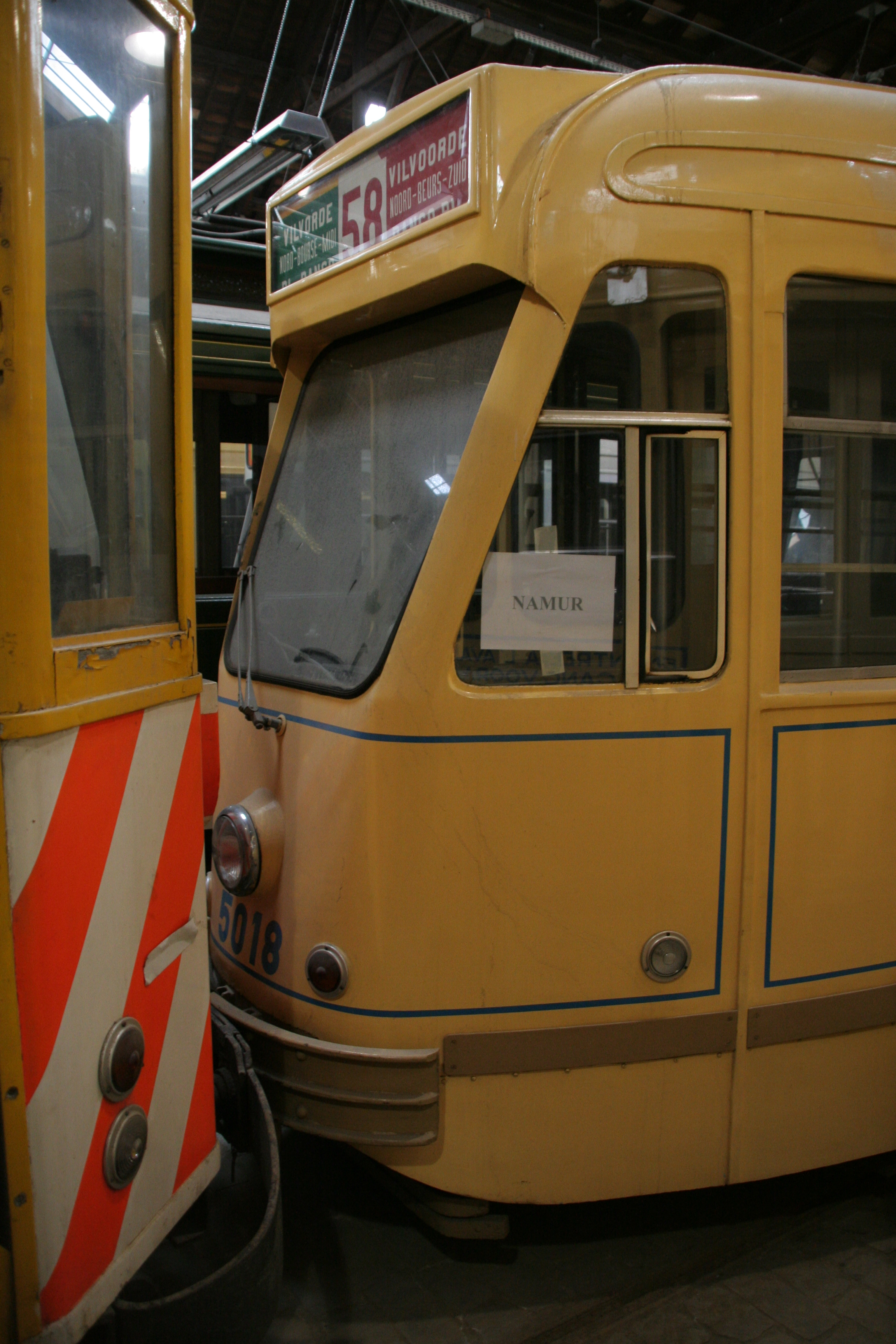 Eerste tram met Europees PCC-car uiterlijk, Woluwe